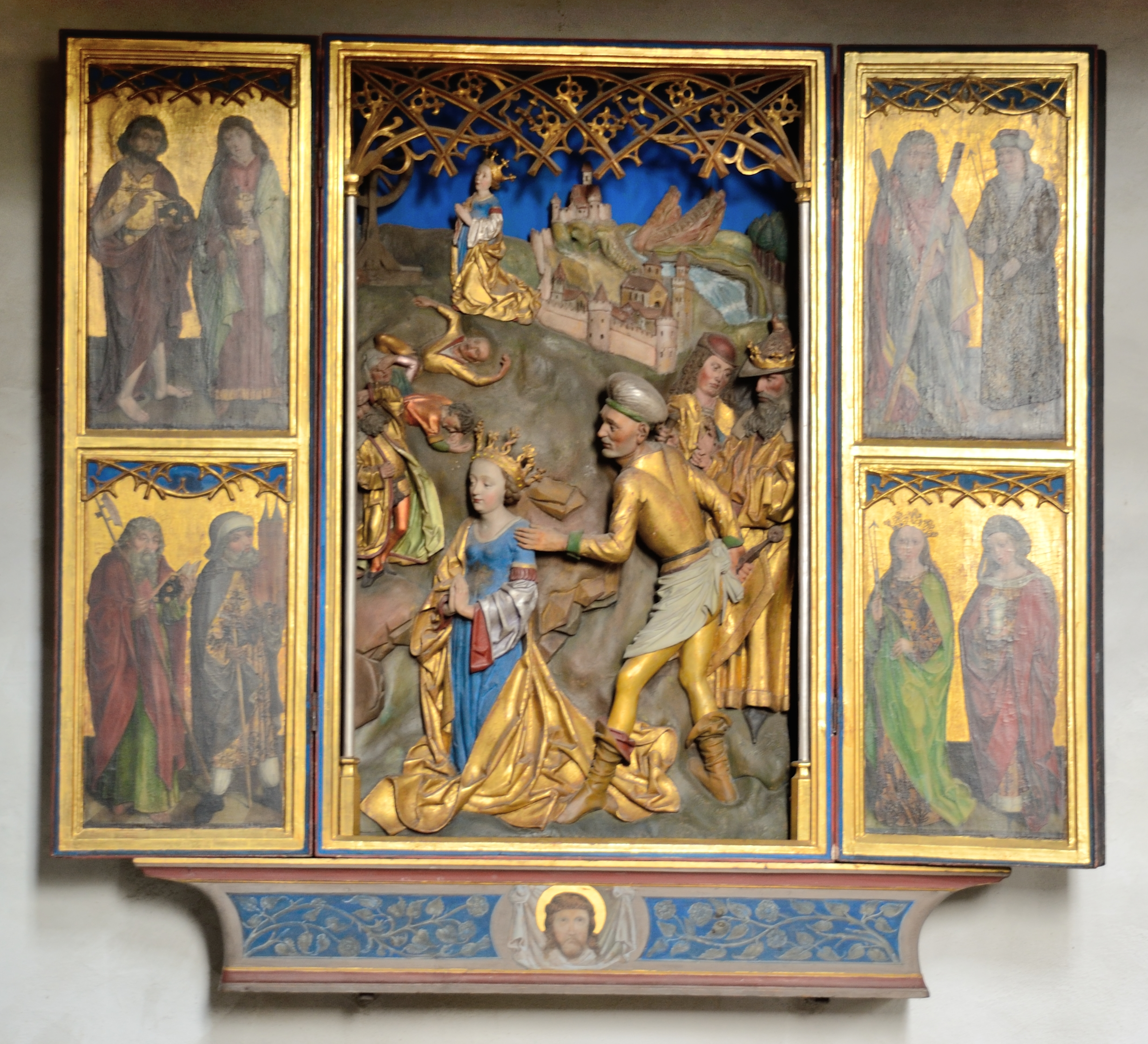 St. Veitskirche (Veitsbronn); Aufsatz des ehemaligen Katharinenaltars